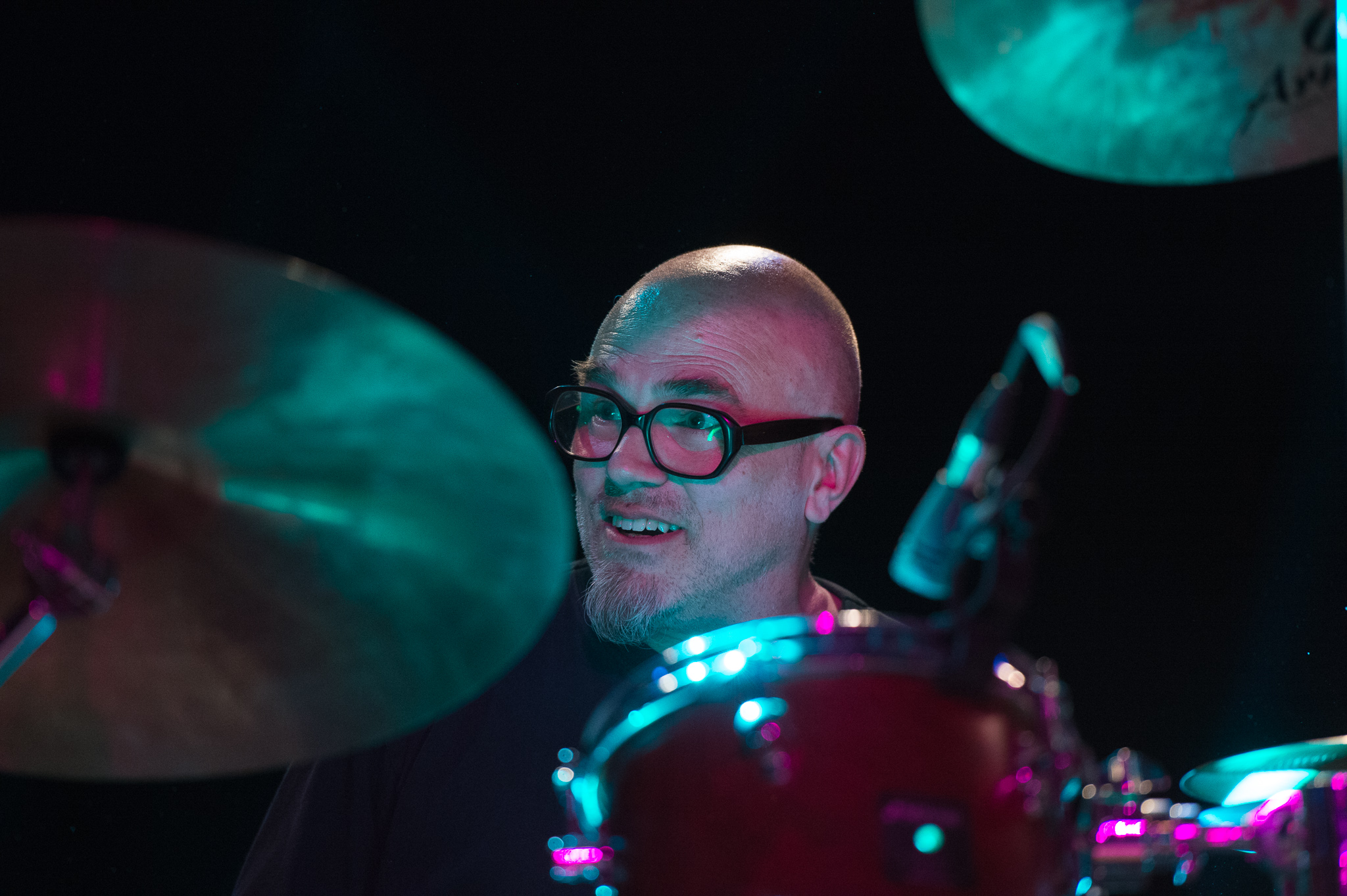 Concertbüro Franken,Der Hirsch,Konzert,Livekonzert,Livemusik,Musik,Strassenjungs,Torsten Dechert